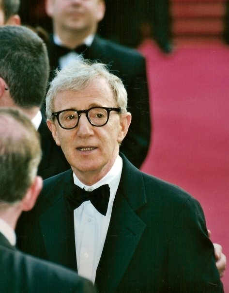 Woody Allen au festival de Cannes.